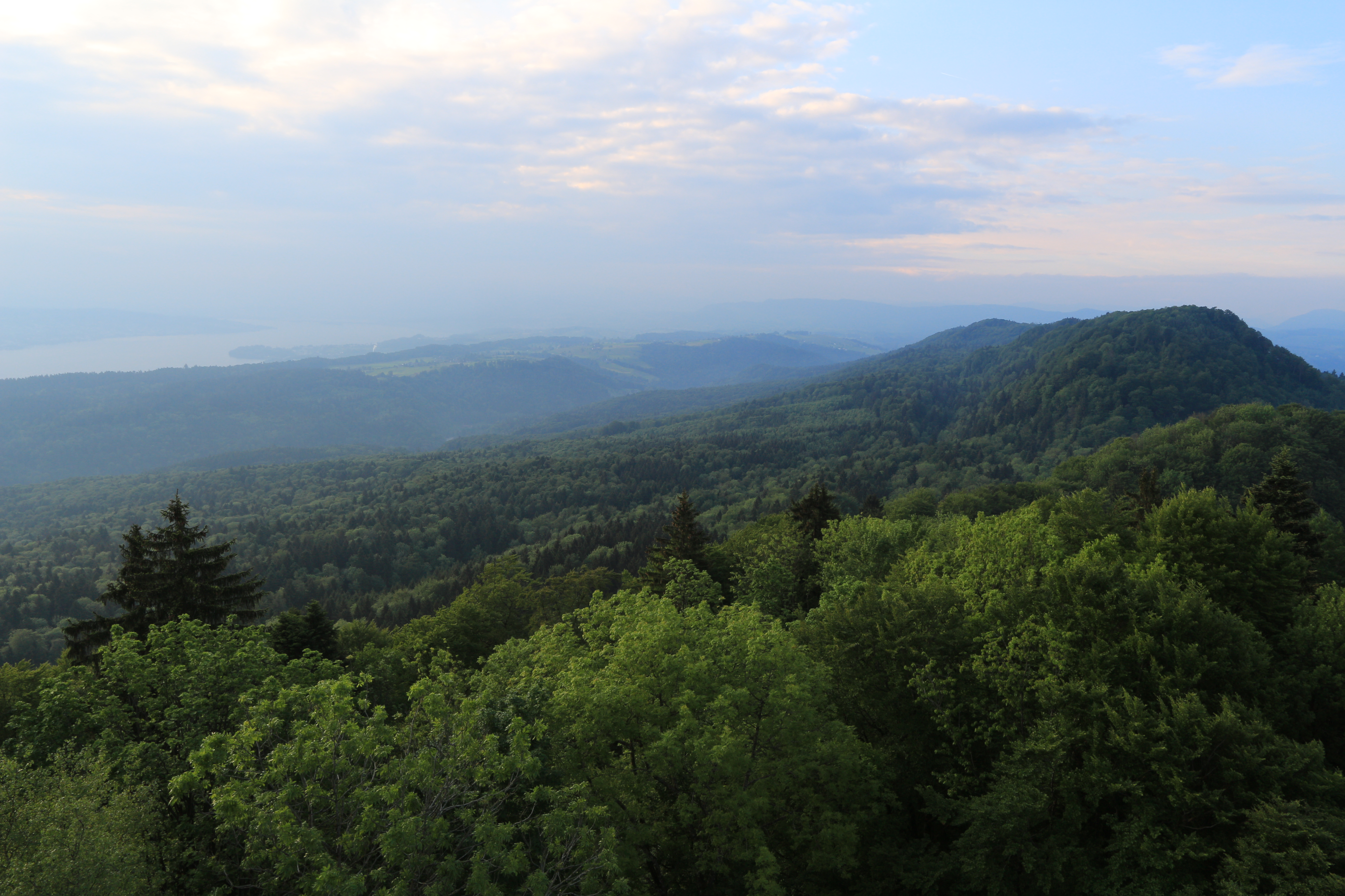 Aussicht vom Aussichtsturm Hochwacht im Wildnispark Zürich-Sihlwald